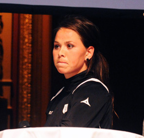 Sara Björk Gunnarsdottir